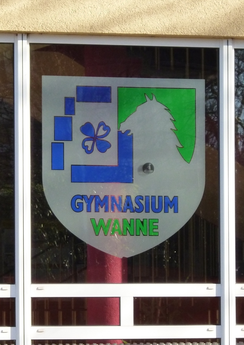 Logo des Mädchengymnasiums Wanne in Herne-Wanne Februar 2014 an einem Fenster zur Stöckstrasse gelegen